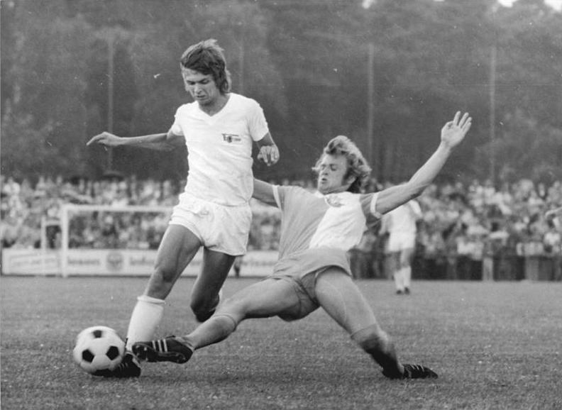 ADN-ZB-Mittelstädt-19.6.76-cb-Berlin: Fußball-Oberliga Aufstiegsspiel 1.FC Union Berlin-FC Hansa Rostock 1: 1-In einer kämpferischen Auseinandersetzung vor 15 000 Zuschauern An der alten Försterei trennten sich die beiden Oberliga-Anwärter mit einem 1: 1 Unentschieden.Hier setzt sich der Union-Spieler K.Heine (l.) gegen den Rostocker J.Kampf durch.